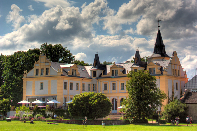 Schloss Liebenberg von Osten, 2008, Löwenberger Land, Land Brandenburg